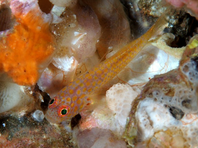 オオメハゼ Trimma macrophthalmum